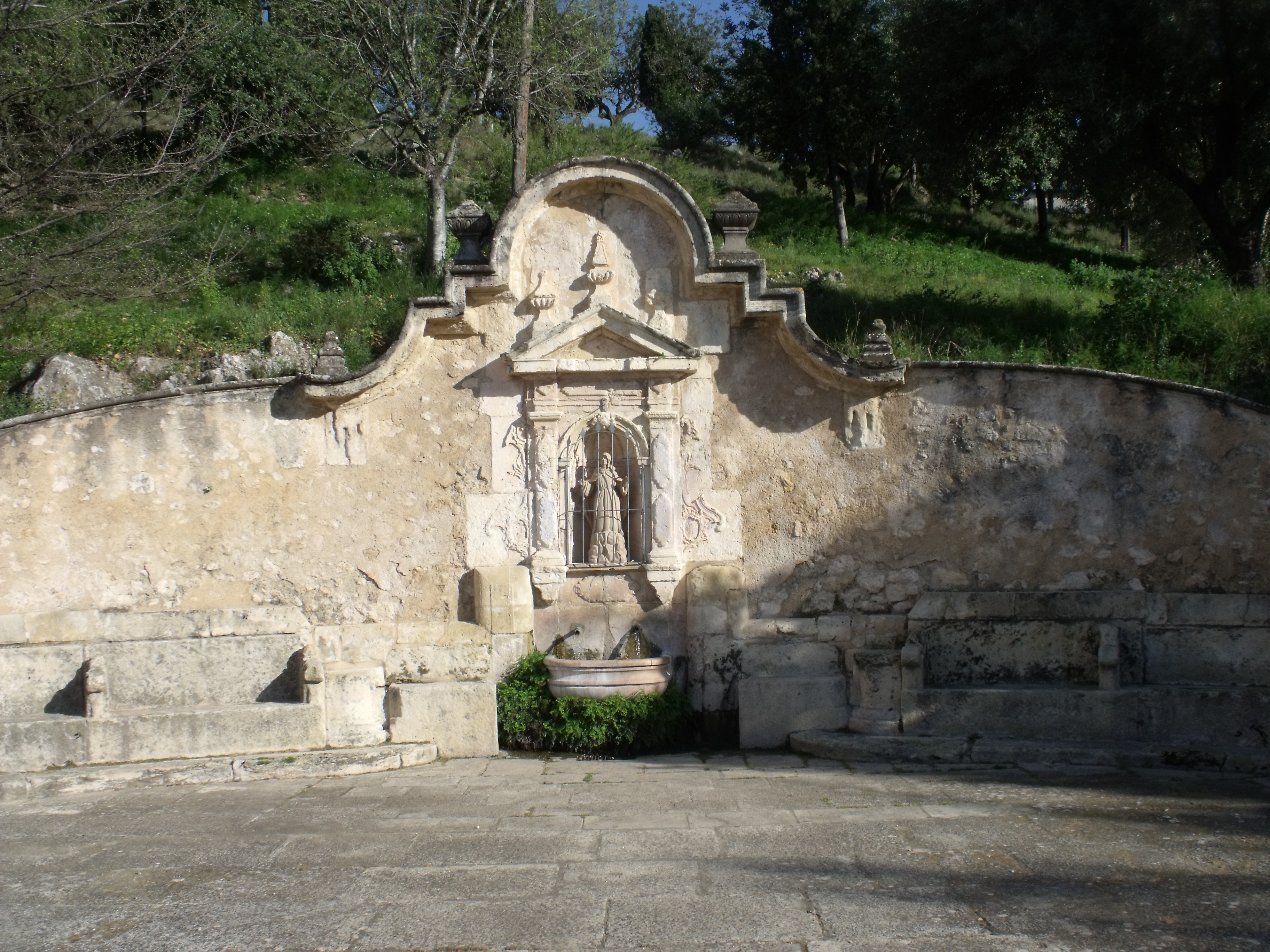 Genovés